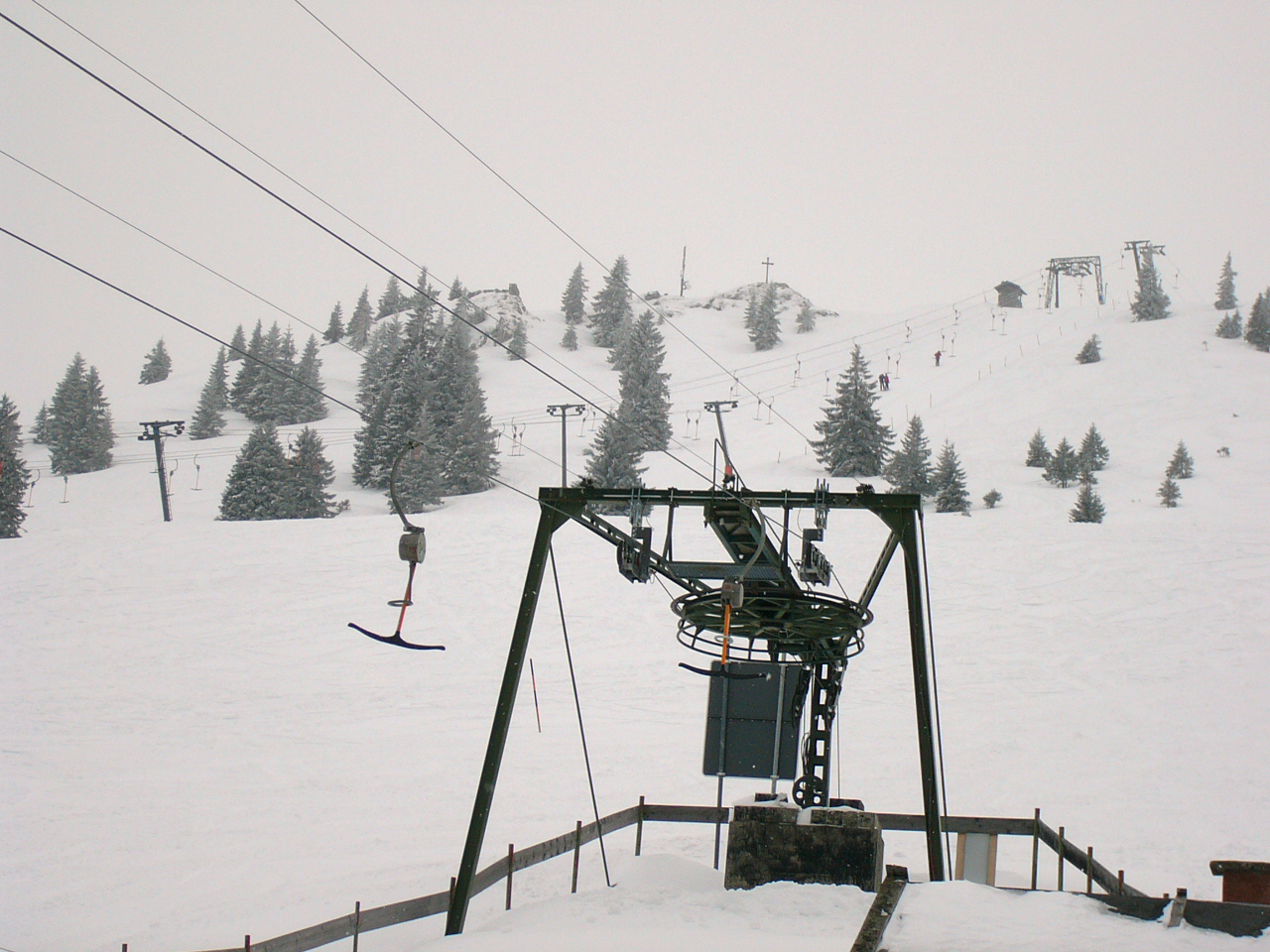 Schlepplift-Ende (Bergstation), Sudelfeld (Bayern).